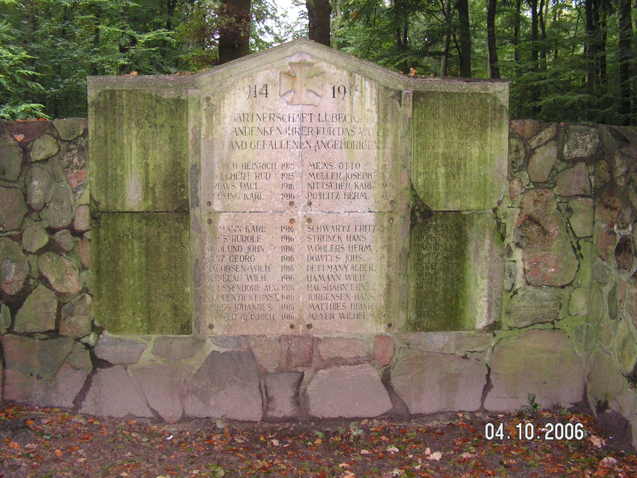 Ehrenfriedhof Lübeck/Gedenkstein D. Lübecker Gärtnerschaft